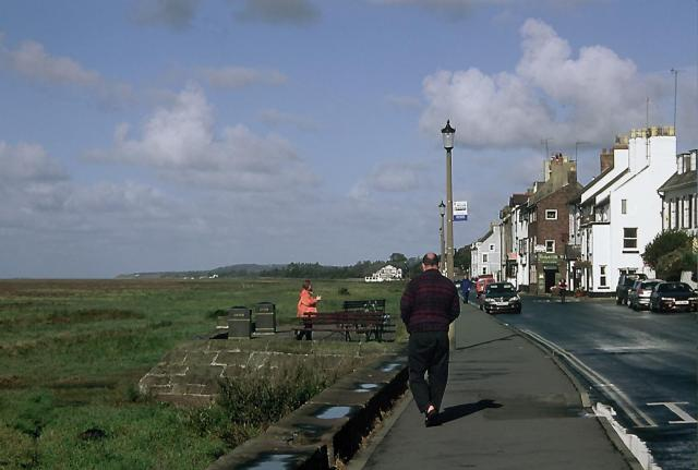 Parkgate